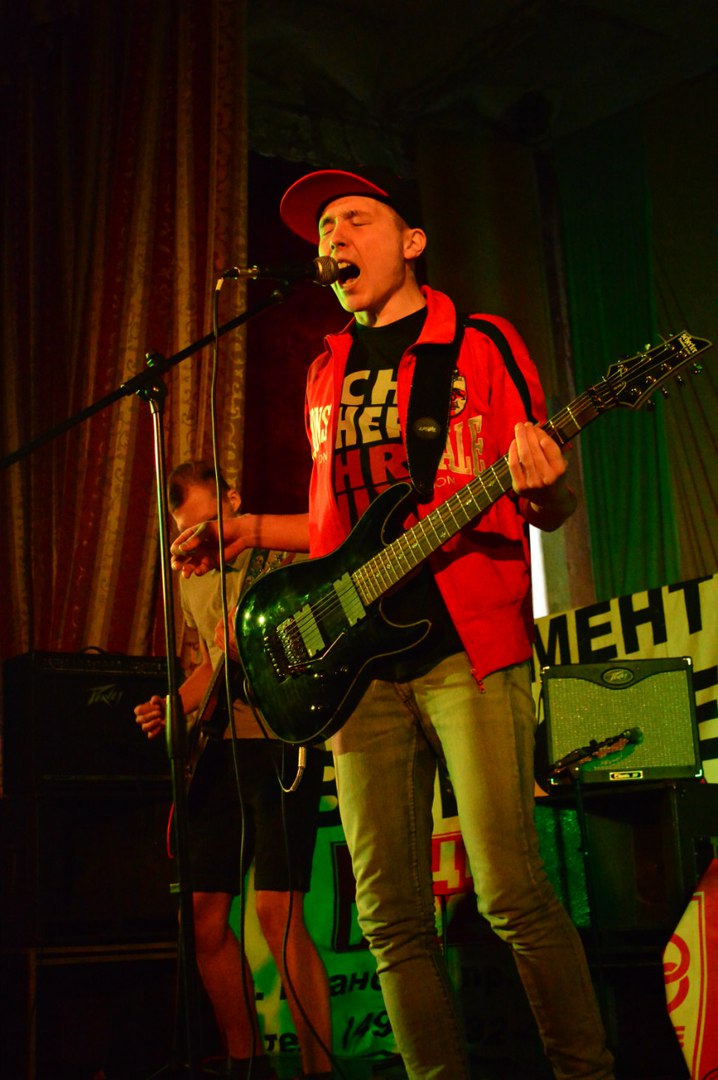 Участники фестиваля разных лет.